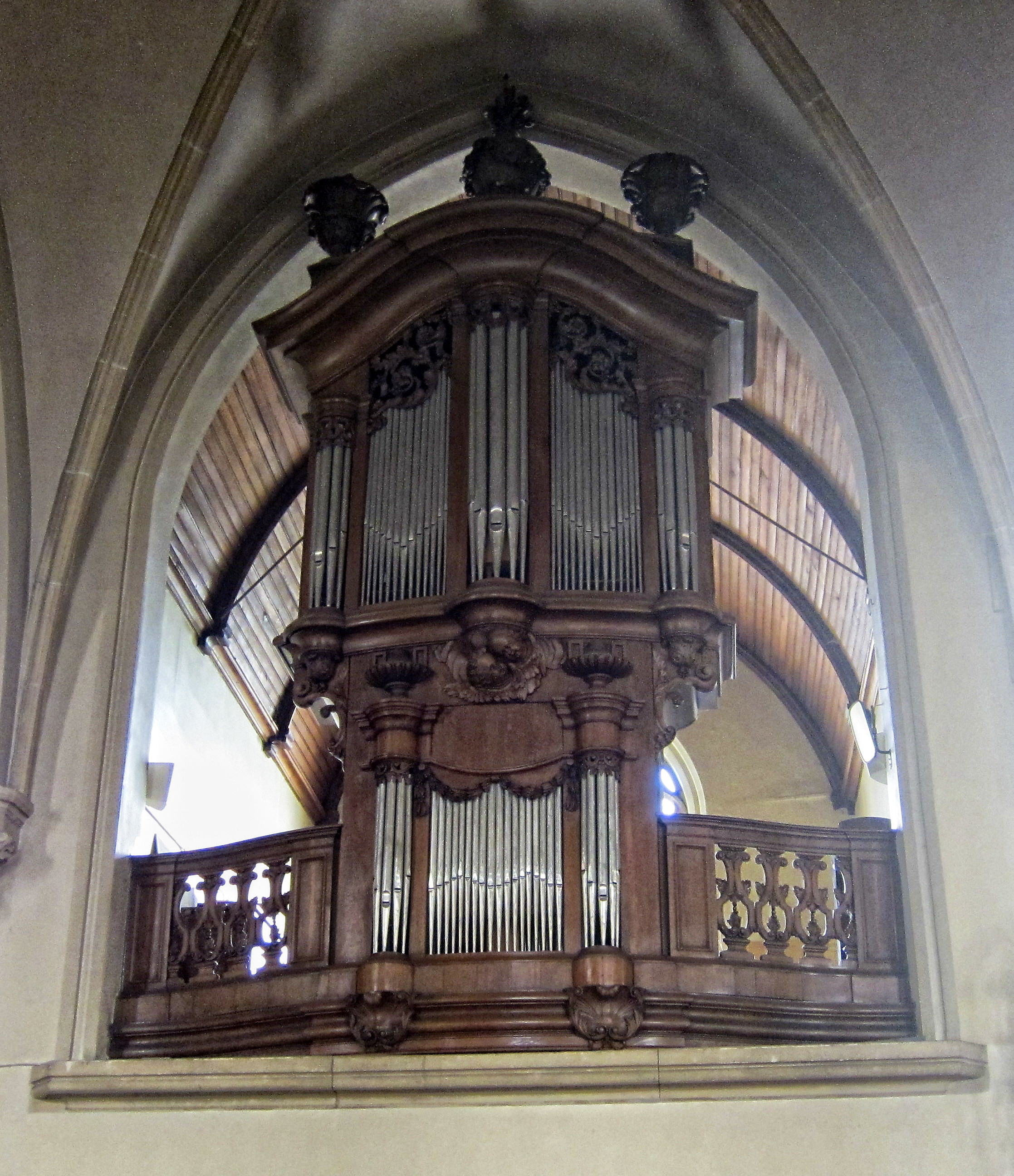 Het Lambertus-Benoit Van Peteghemorgel in de Sint-Martinuskerk te Berlare, België